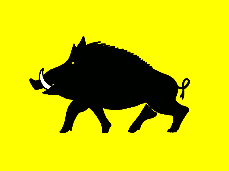 Evergem's Flag